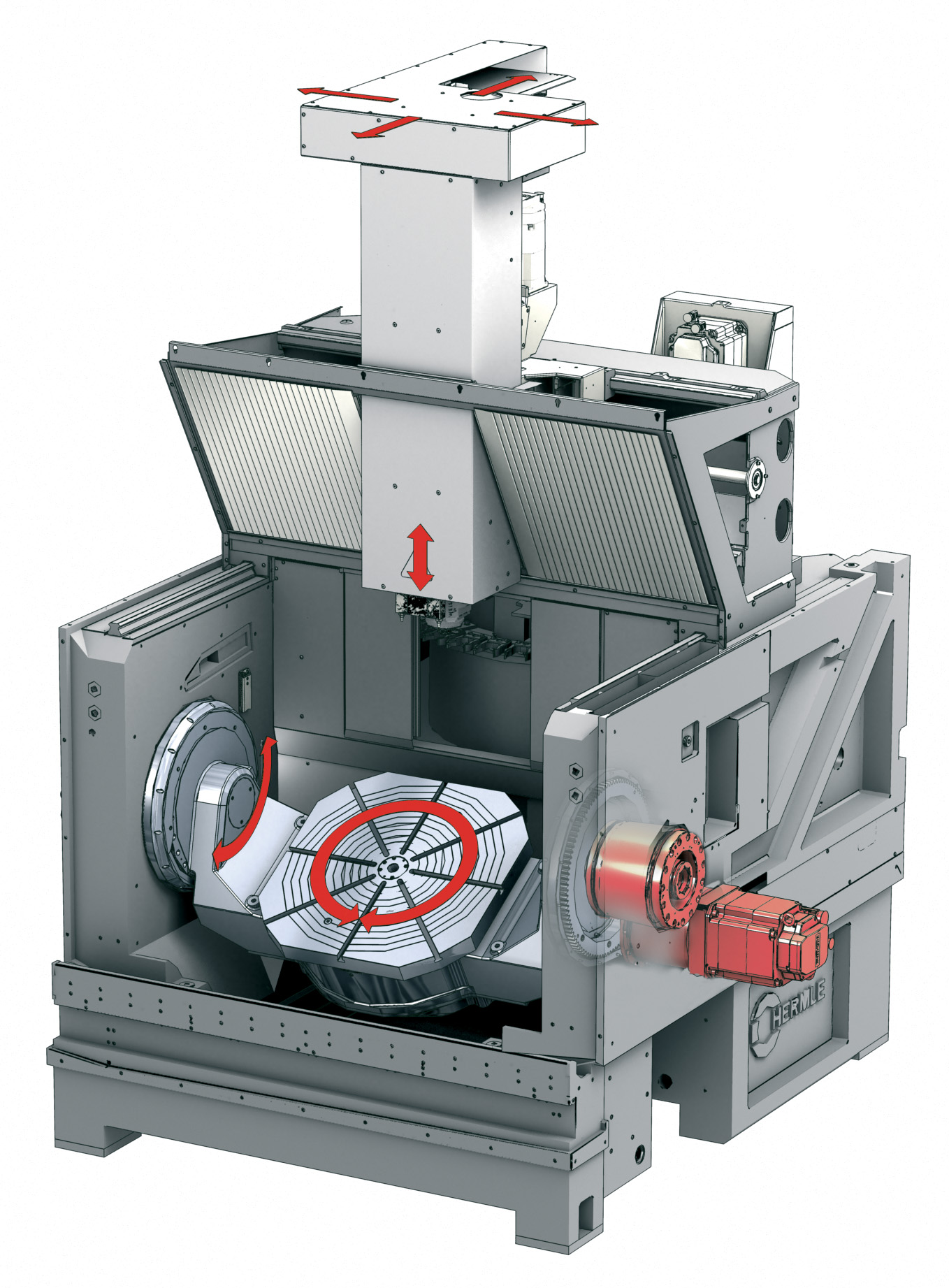 Bearbeitungszentrum, milling machine